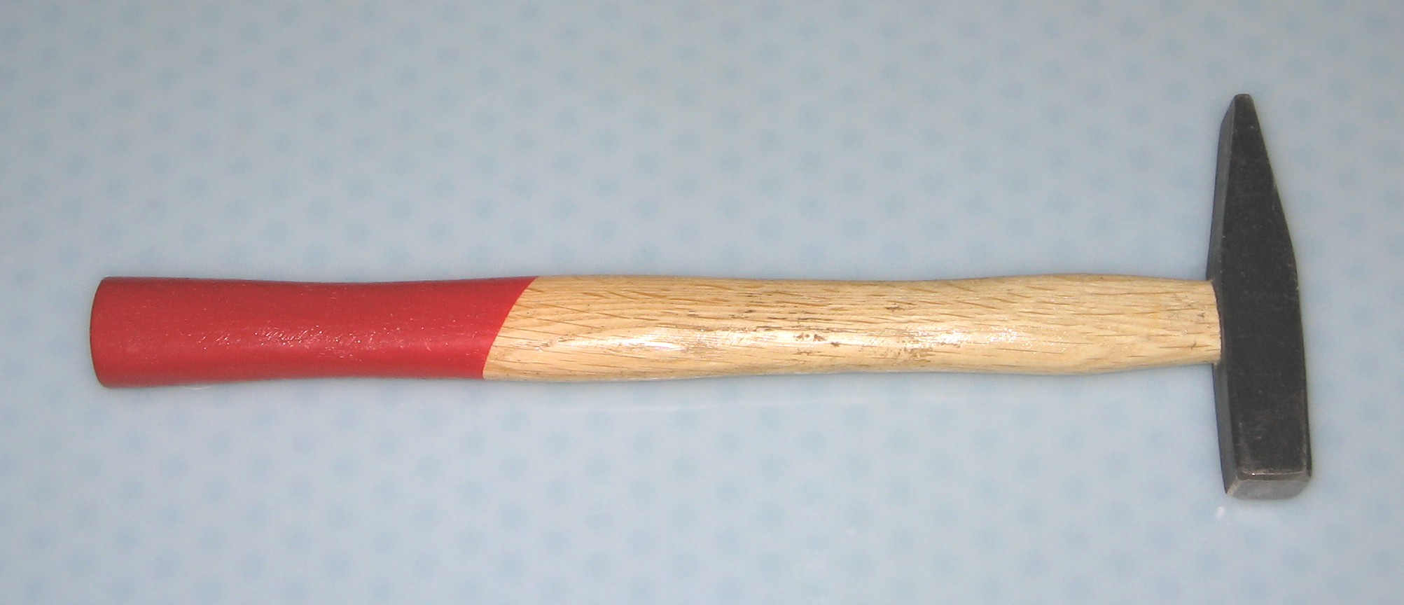 Serurista martelo. La foto estis farita de mi mem.